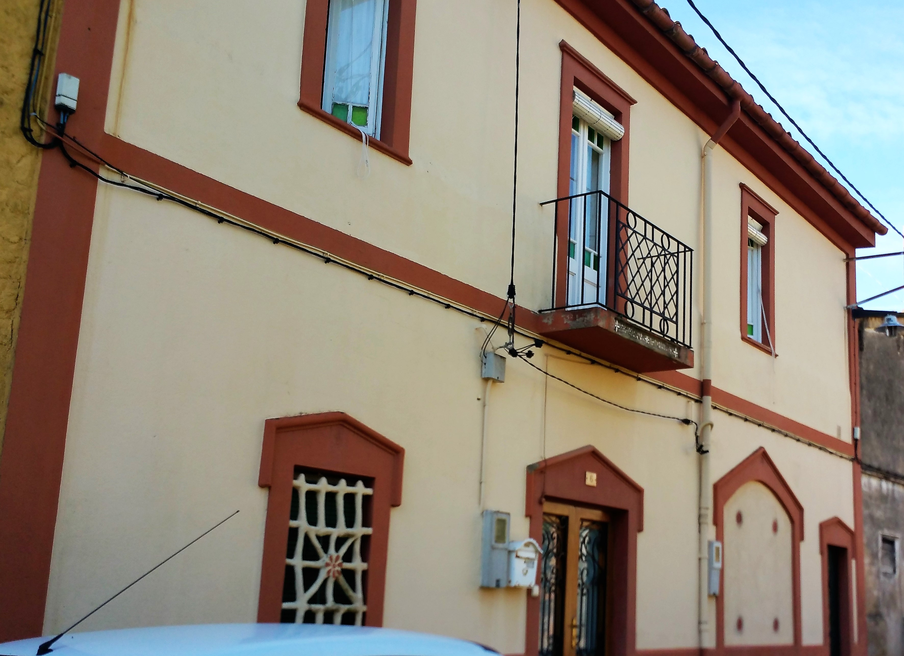 Casa al carrer Empordà, 6 (Saus, Camallera i Llampaies)